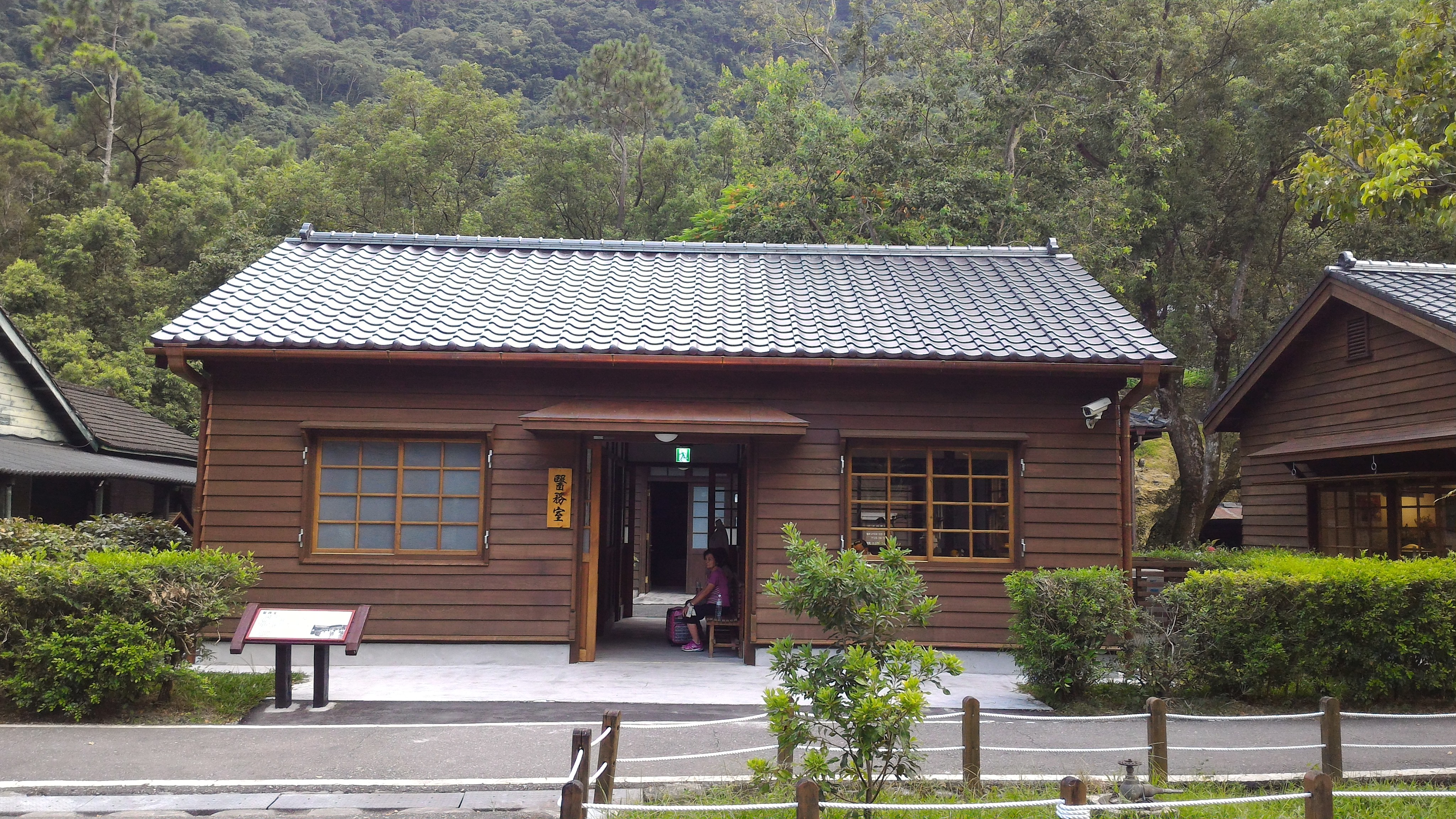 中文（台灣）: 林田山林業文化園區醫務室。